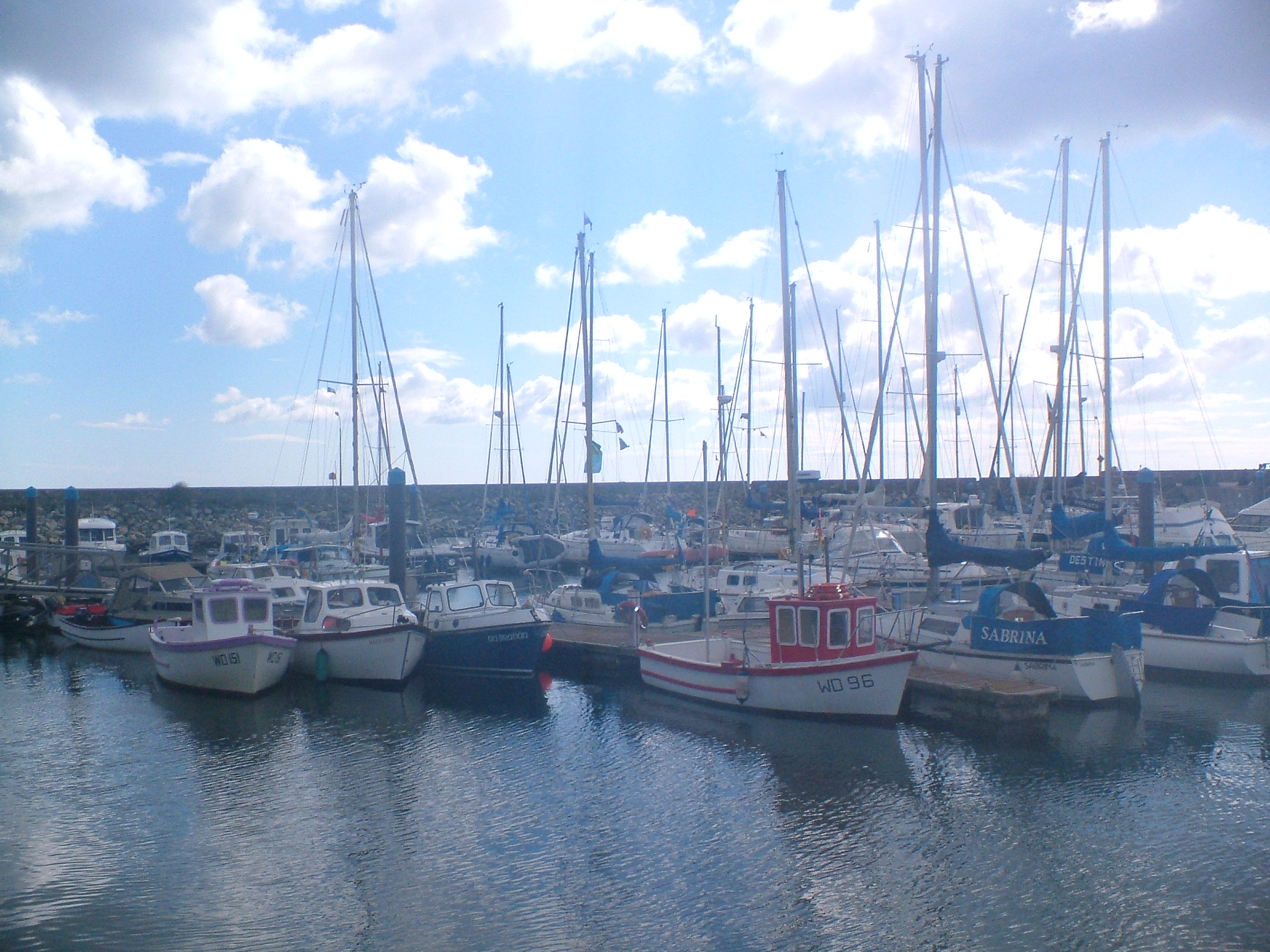 Kilmore Marina